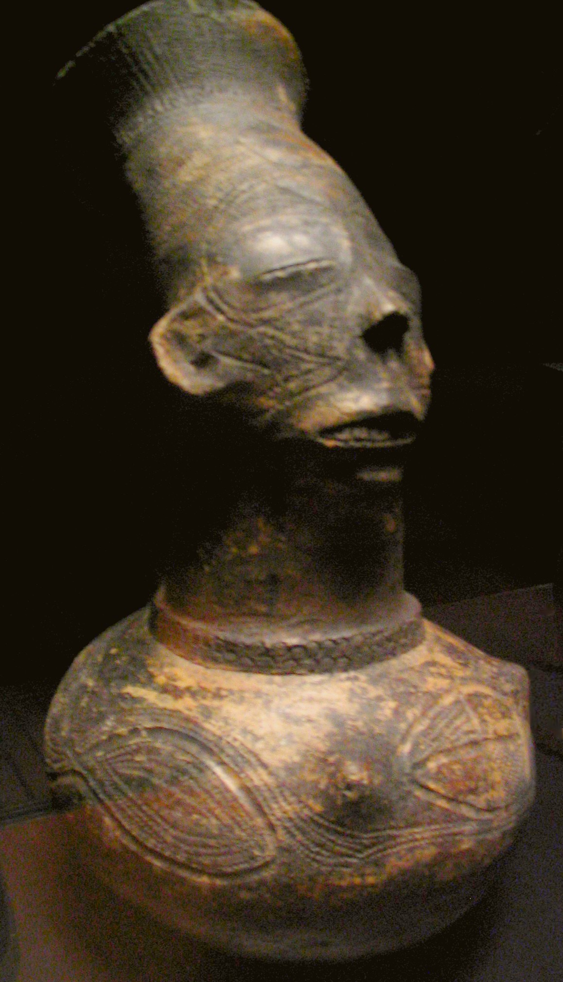 Céramique antropomorphe, Cameroun, Musée du Quai Branly, Paris, France